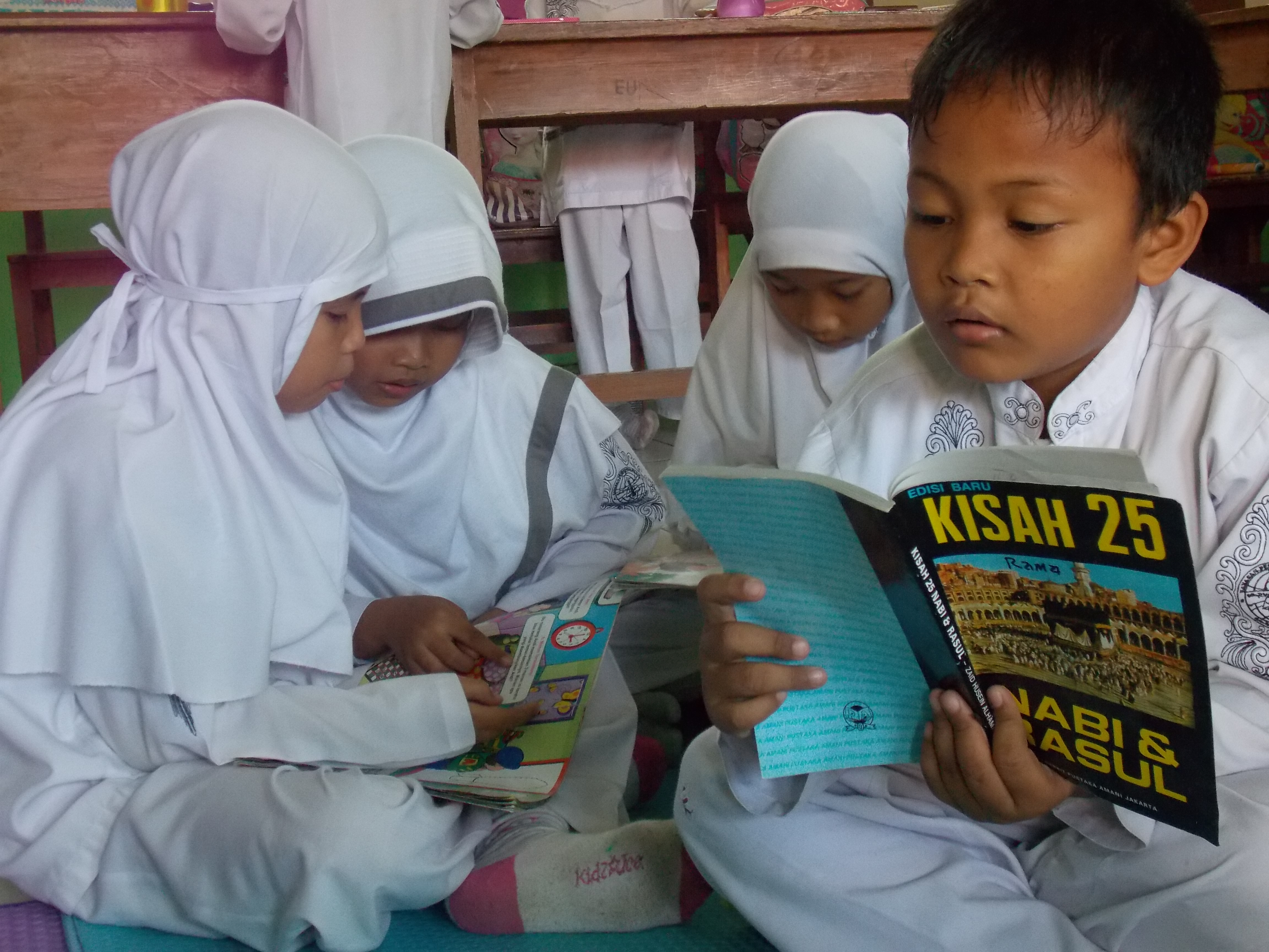 Halaman depan SD. Islam Plus As-Sa'adatain